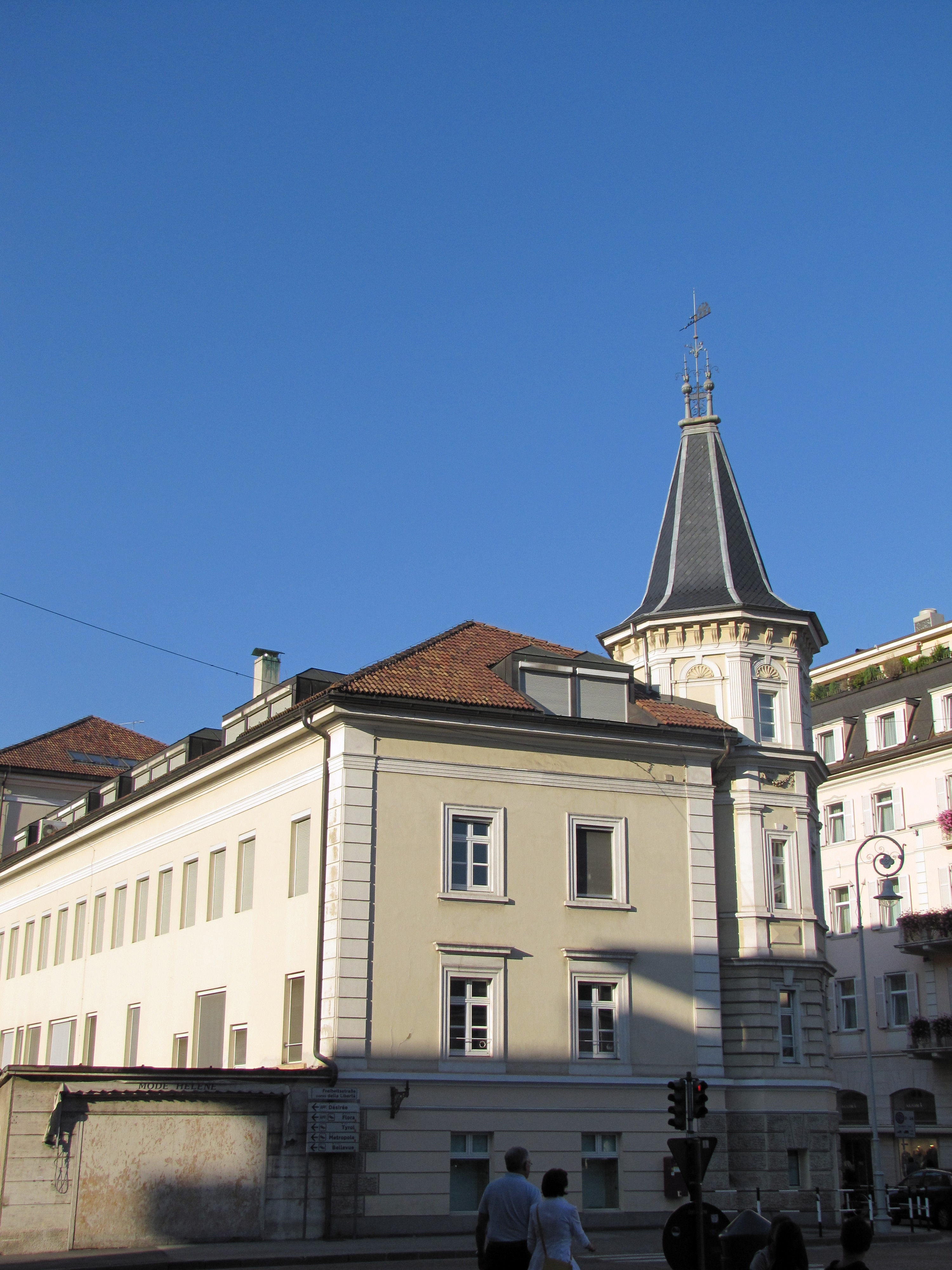 Stadtgymnasium Meran